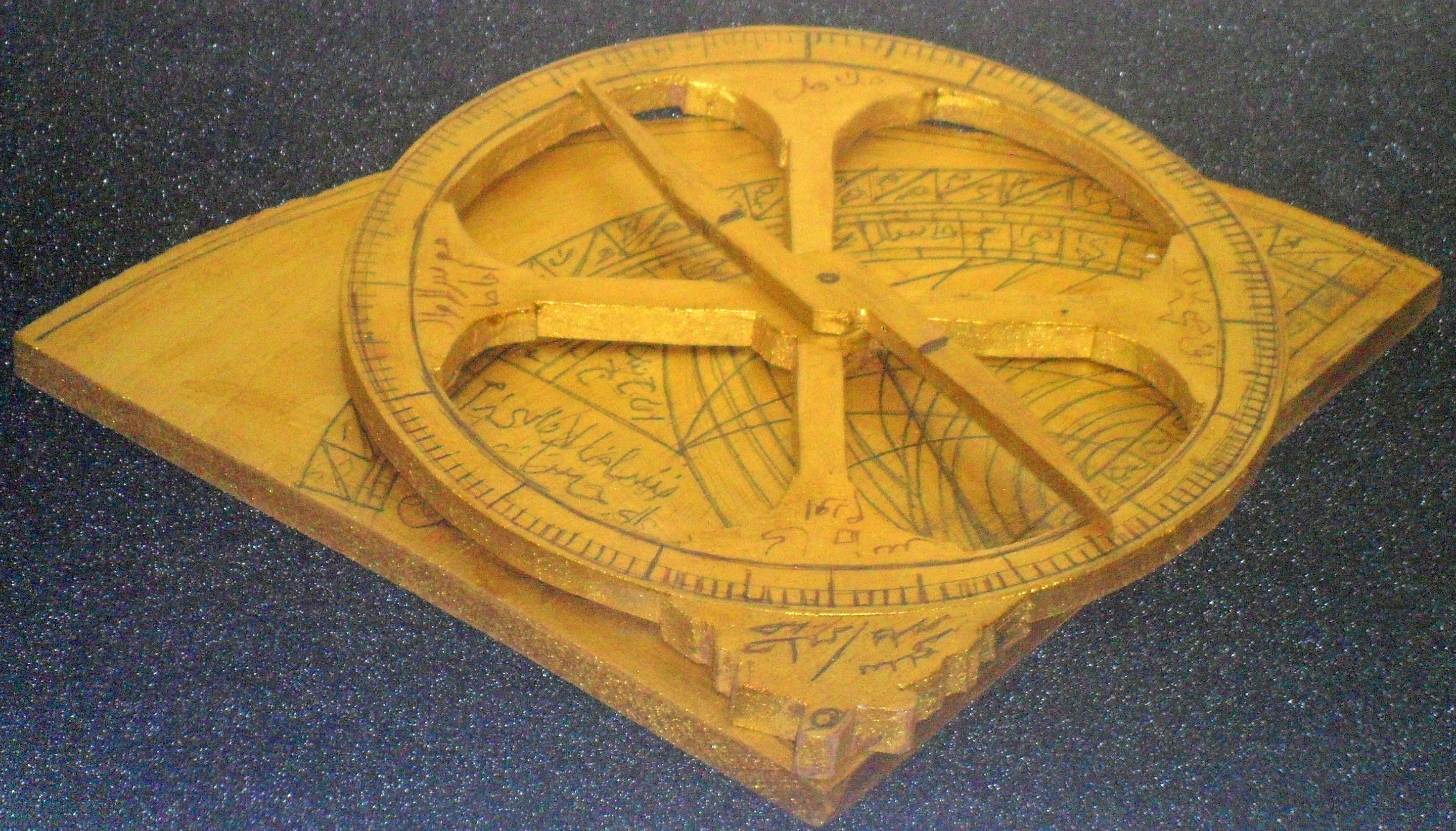 Mersin Deniz Müzesinde sergilenmekte olan Osmanlı üretimi bir usturlab.